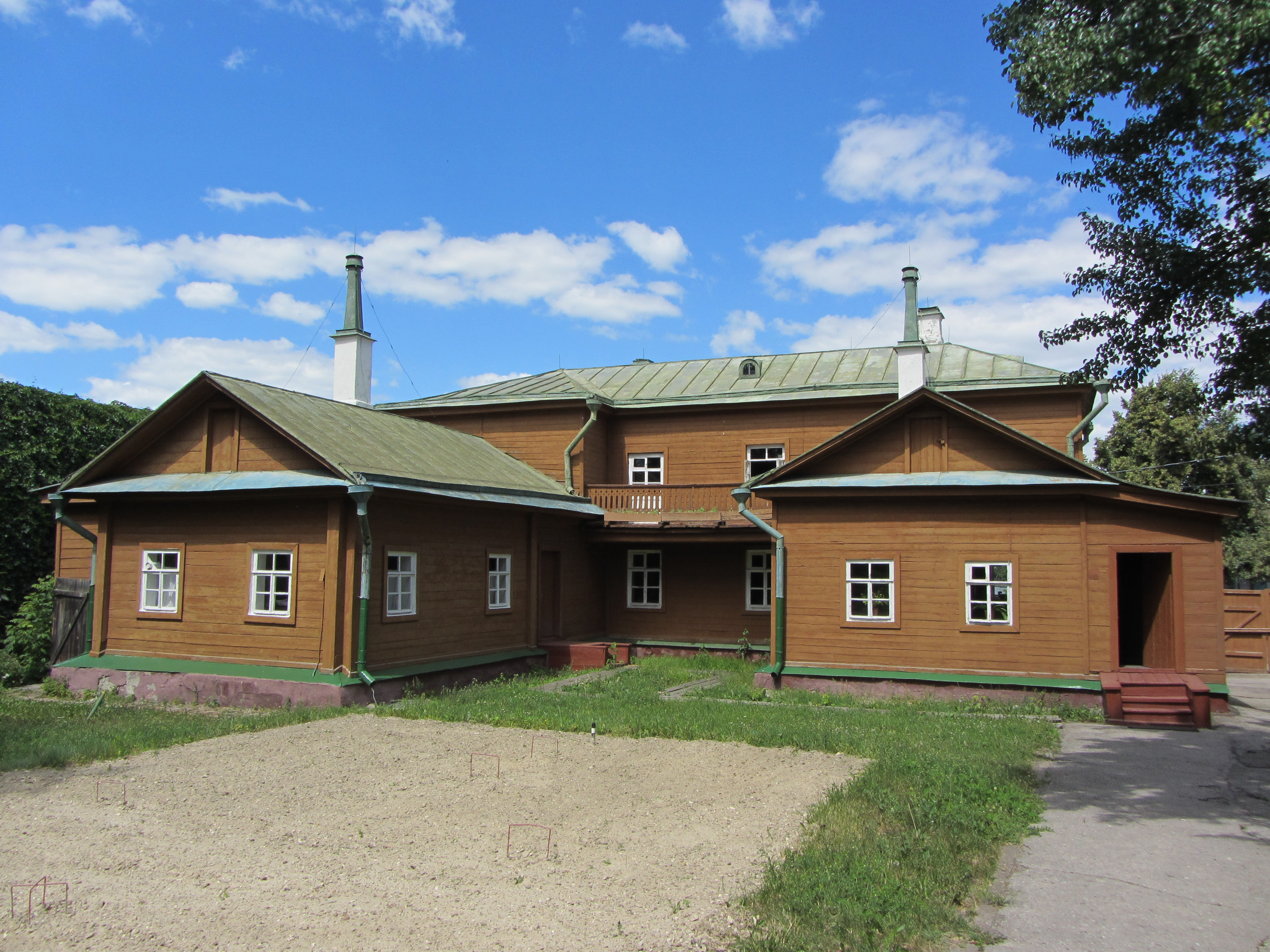 Музей-квартира семьи Ульяновых